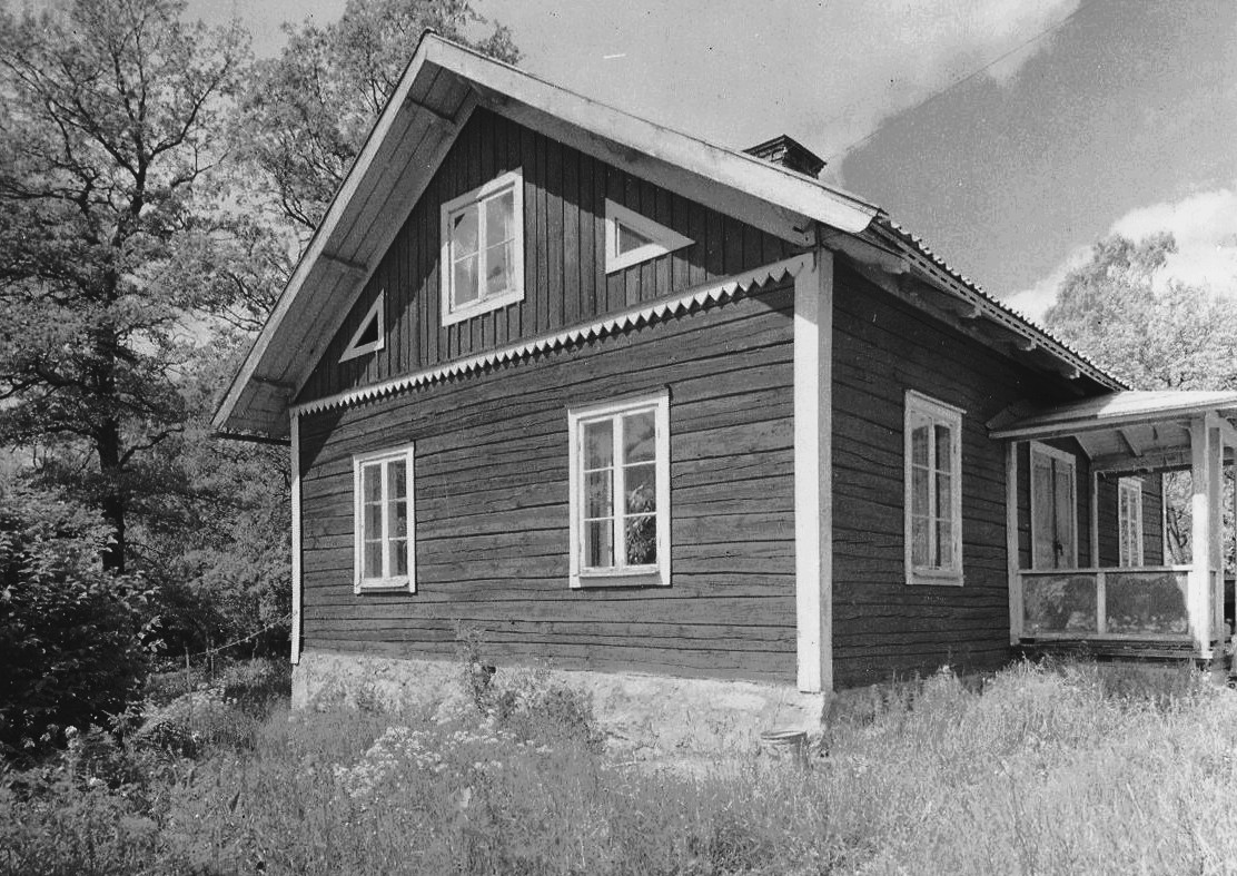 Jordbruksfastigheten Ormkärr, Älvsjö.